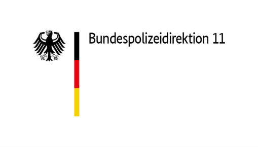 Wortbildmarke der Bundespolizeidirektion 11